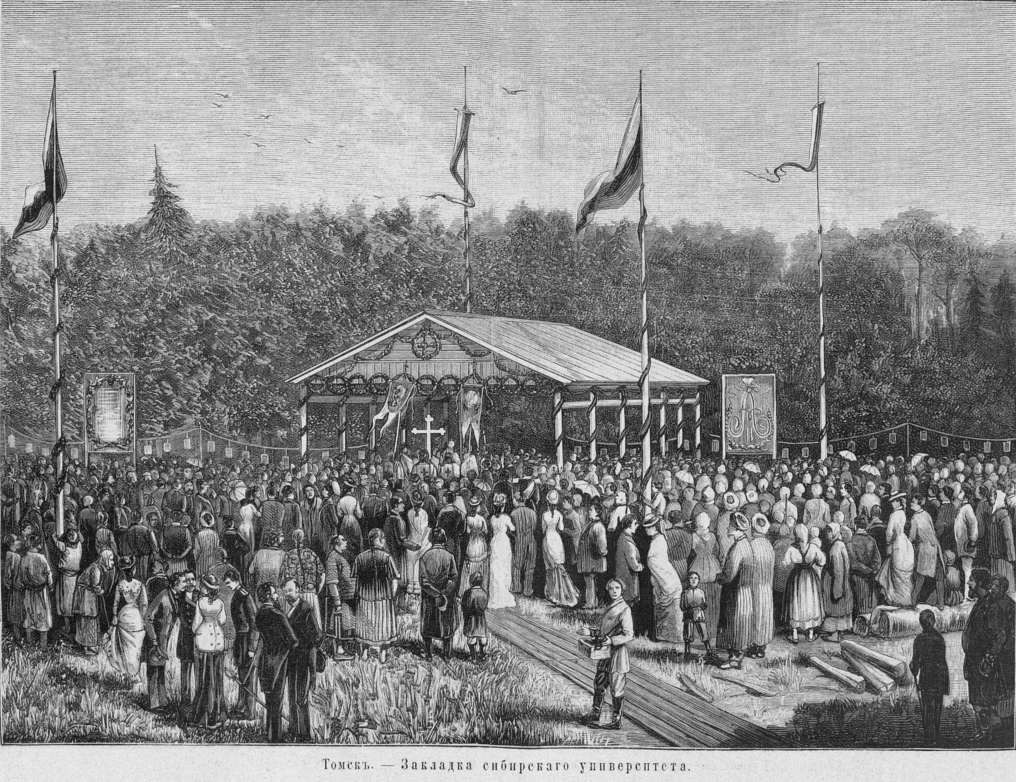 Закладка Сибирского университета, 1880 год.See also: File:47 Закладка Императорского Томского университета 26 августа 1880 года.jpg.